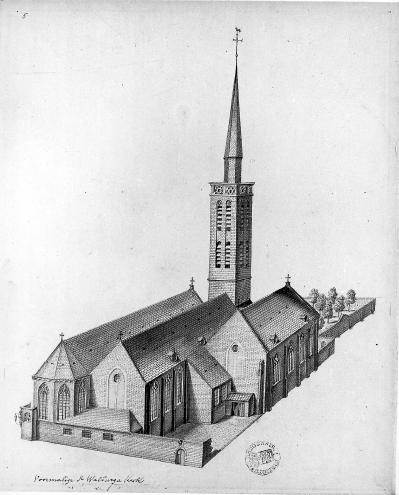 oude Sint-Walburgakerk (Brugge) Commune: Brugge[deelgemeente] Institution: Steinmetzkabinet Type d'objet: tekening Titre: de oude Sint-Walburgakerk te Brugge Auteur: Beerblock, Jan (tekenaar) Date: de 1739 (geboorte) Ã 1806 (dood) Provenance: Brugge, Stadsbibliotheek Inscription: inscriptie, geschreven, onderaan: kerk van St Walburge met den ouden tooren MatÃ©riaux: inkt Technique: getekend, lavis[techniek] Dimensions: hoogte 53.6 cm breedte 36.5 cm Remarques gÃ©nÃ©rales: behoort tot een reeks gezichten op kloosters en kapellen te Brugge